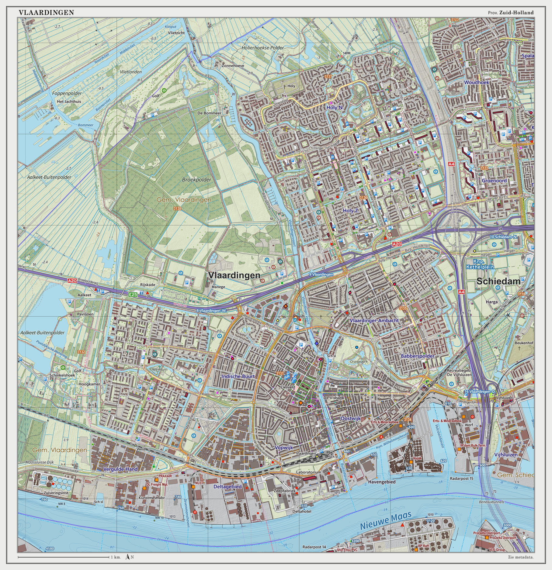 Topografische kaart van Vlaardingen (woonplaats). Resolutie: 300 pixels/km. Kaartbeeld samengesteld uit de open geodata van de Top10NL en Top25namen (Basisregistratie Topografie, Kadaster), Creative Commons BY licentie. Gebouwvlakken uit open geodata BAG extract. Wegen uit de OpenStreetMap. Reliëfschaduw uit de Actuele Hoogtekaart AHN2. Samenstelling en kleurenschema: Jan-Willem van Aalst, met QGIS2. Zie ook de Legenda.